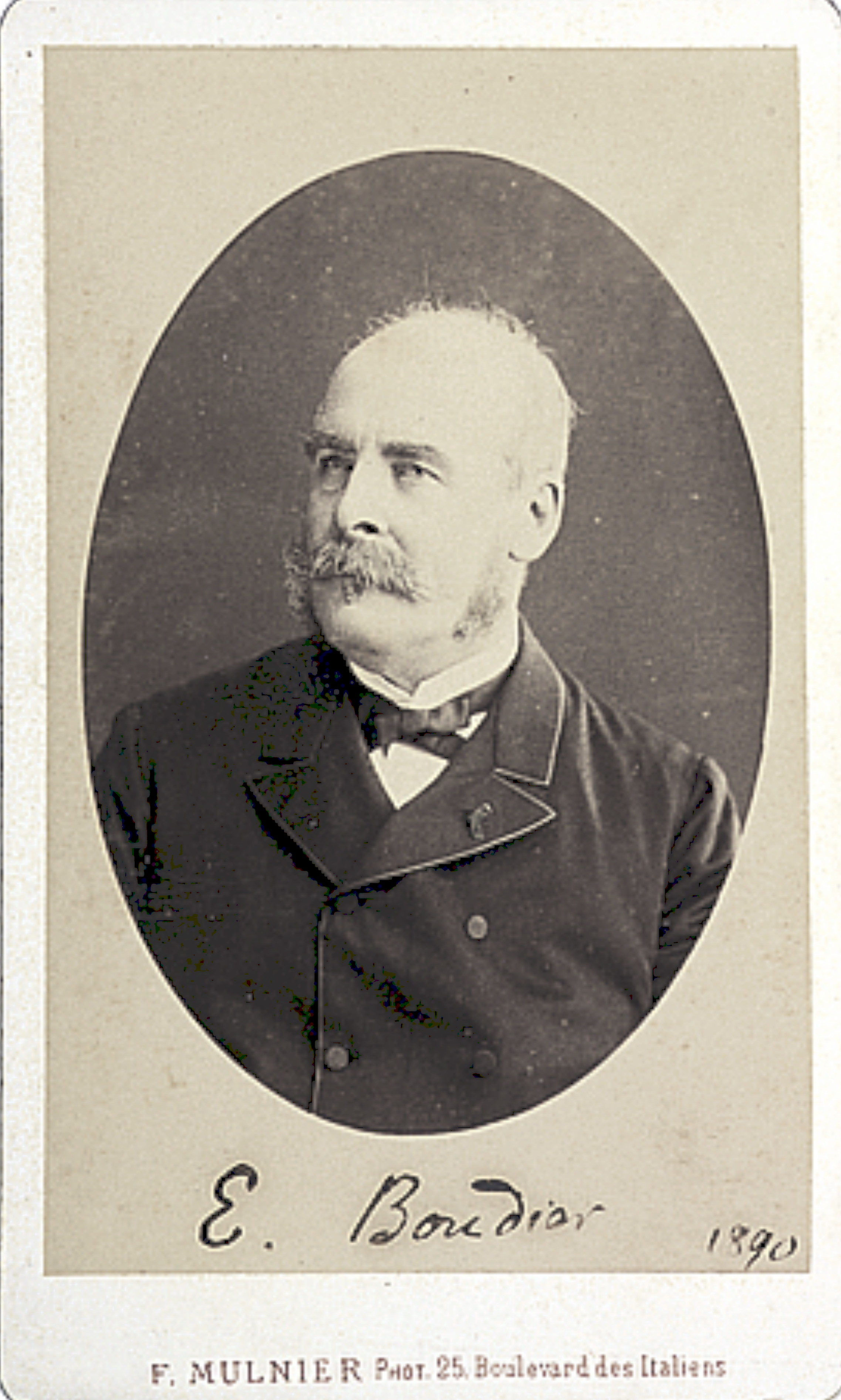 Photo envoyée à Saccardo, avec au verso médaille d'argent de l'exposition Universelle de Paris 1878 et mention manuscrite à l'encre "à monsieur le Professeur Saccardo souvenir affecteux signé: Boudier. Au recto de l'écriture manuscrite de Saccaro "E. Boudier 1890".